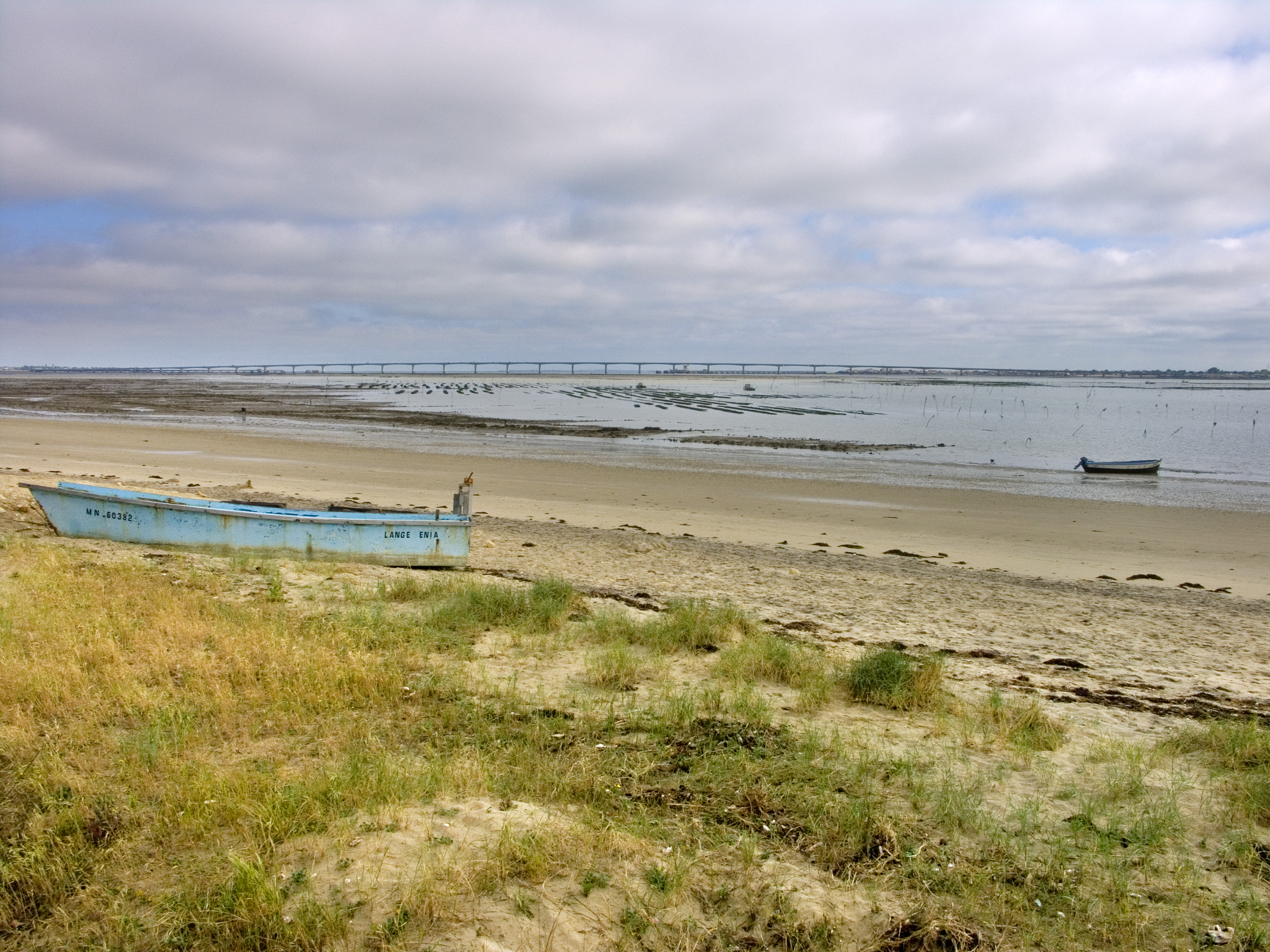 Ambiance en Ile d'Oléron. Pont d'Oléron dans le lointain.